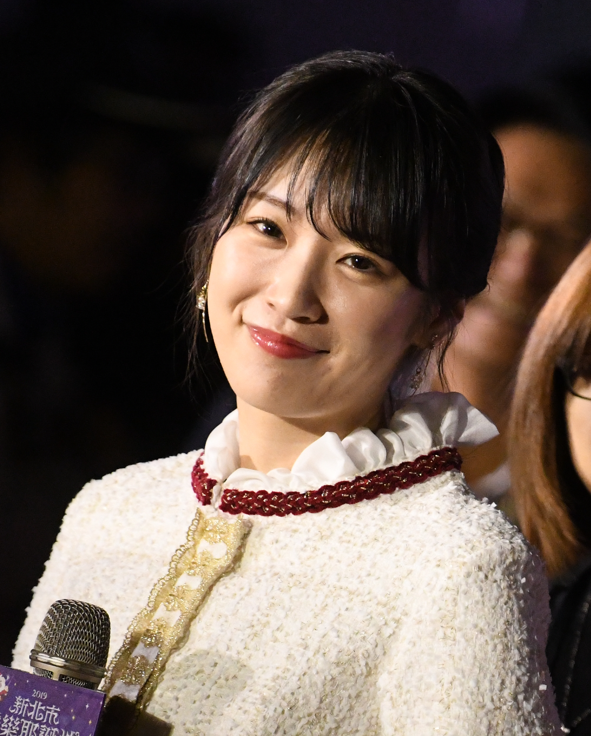 2019.11.15 乃木坂46 高山一実、松村沙友理「2019新北市歡樂耶誕城 」開幕點燈儀式@新北板橋市民廣場